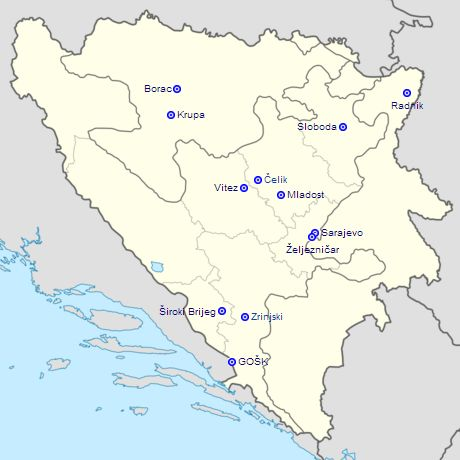 Lokacije ekipa u Premijer ligi Bosne i Hercegovine 2017/2018.